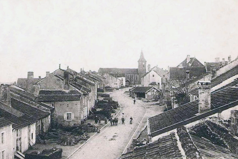 Rue Varandelle à Varennes-sur-Amance, au début du XXème siècle.